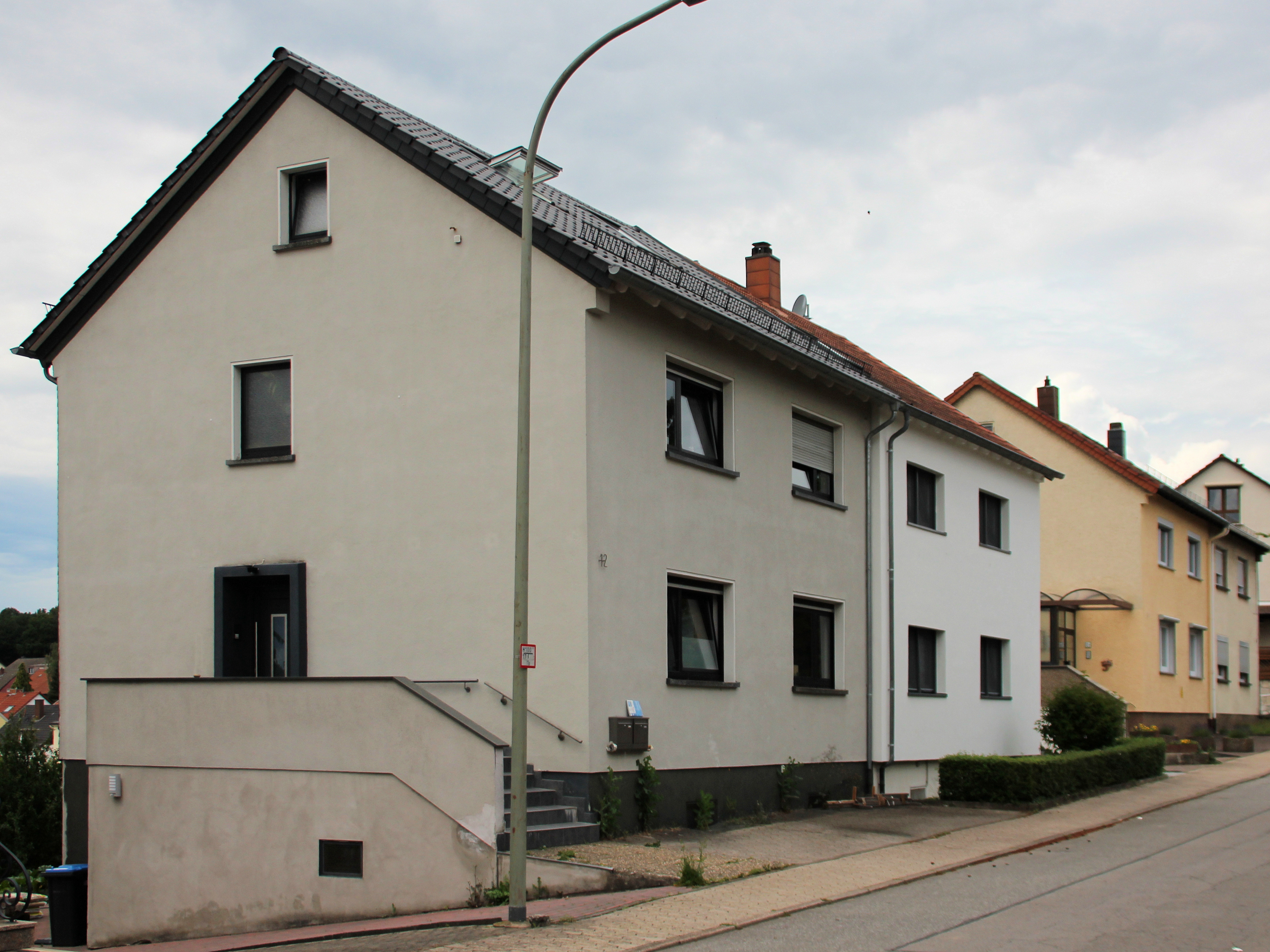 am wenigsten veränderte Häuser der Kettler-Siedlung in Friedrichthal (Hölderlinstraße)